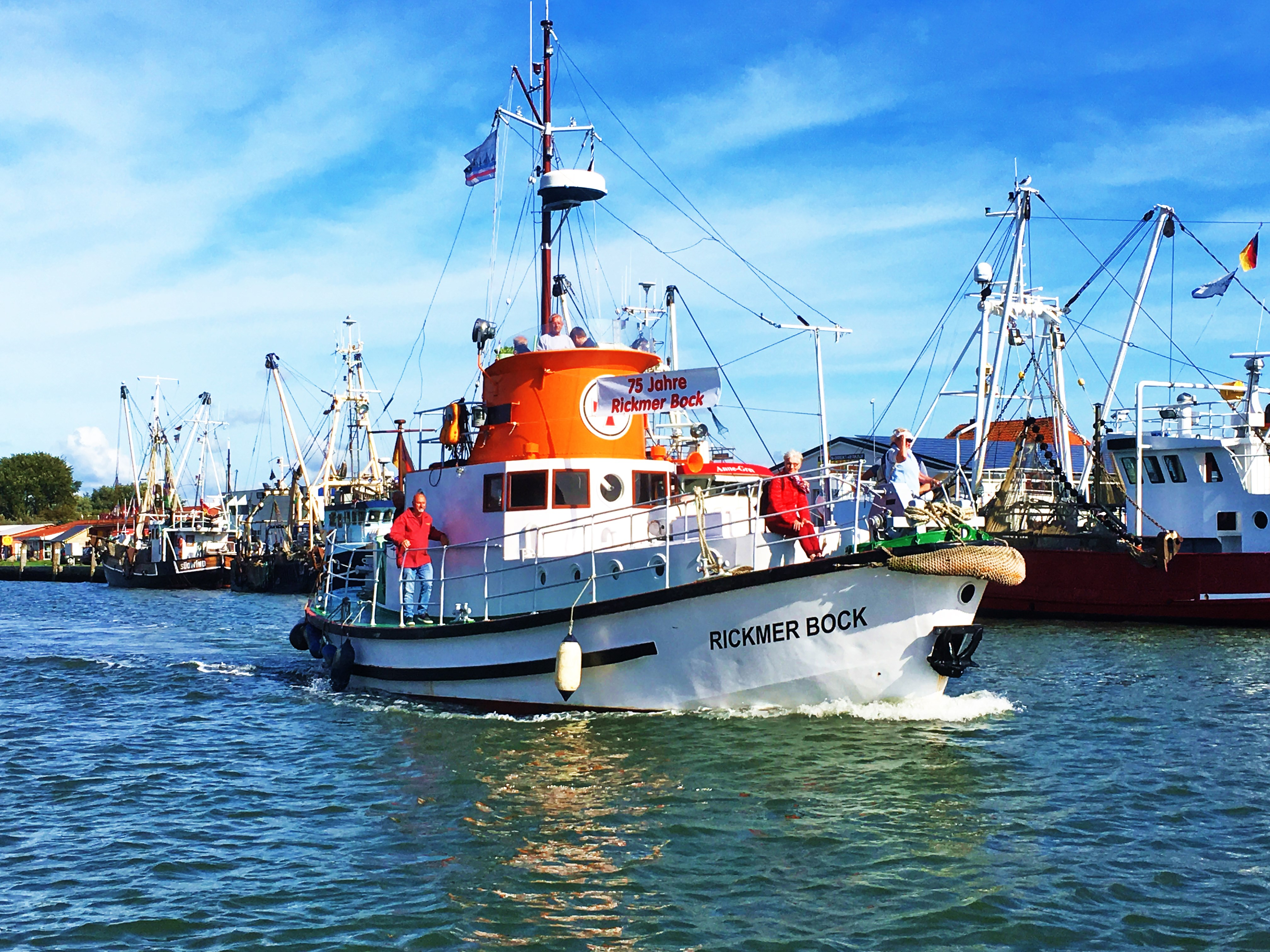 Rickmer Bock beim 75-jährigem Jubiläum